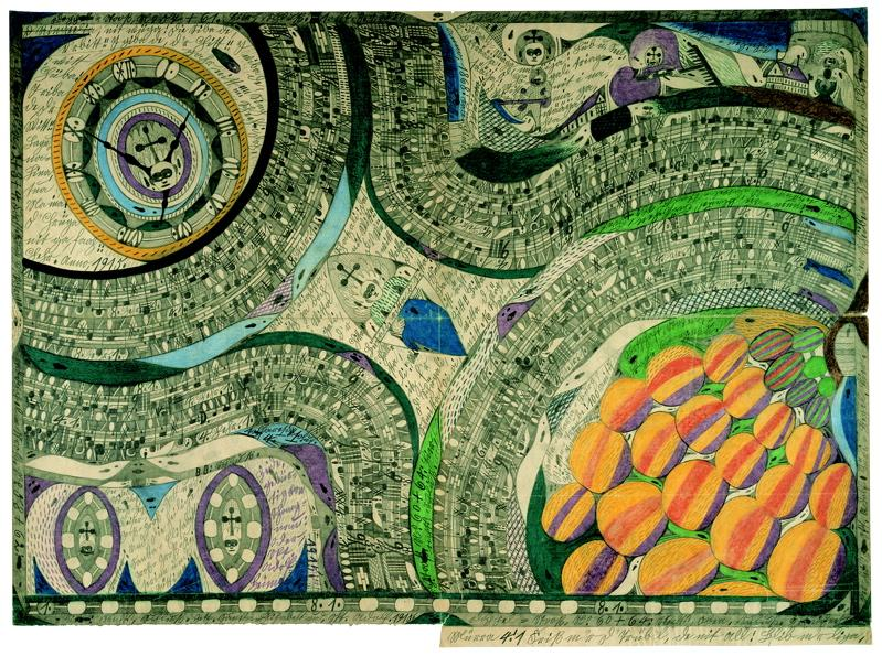 Santta-Maria-Burg-Riese-Traube: 100 Unitif Zohrn Tonnen schwer, 1915, auf Zeitungspapier